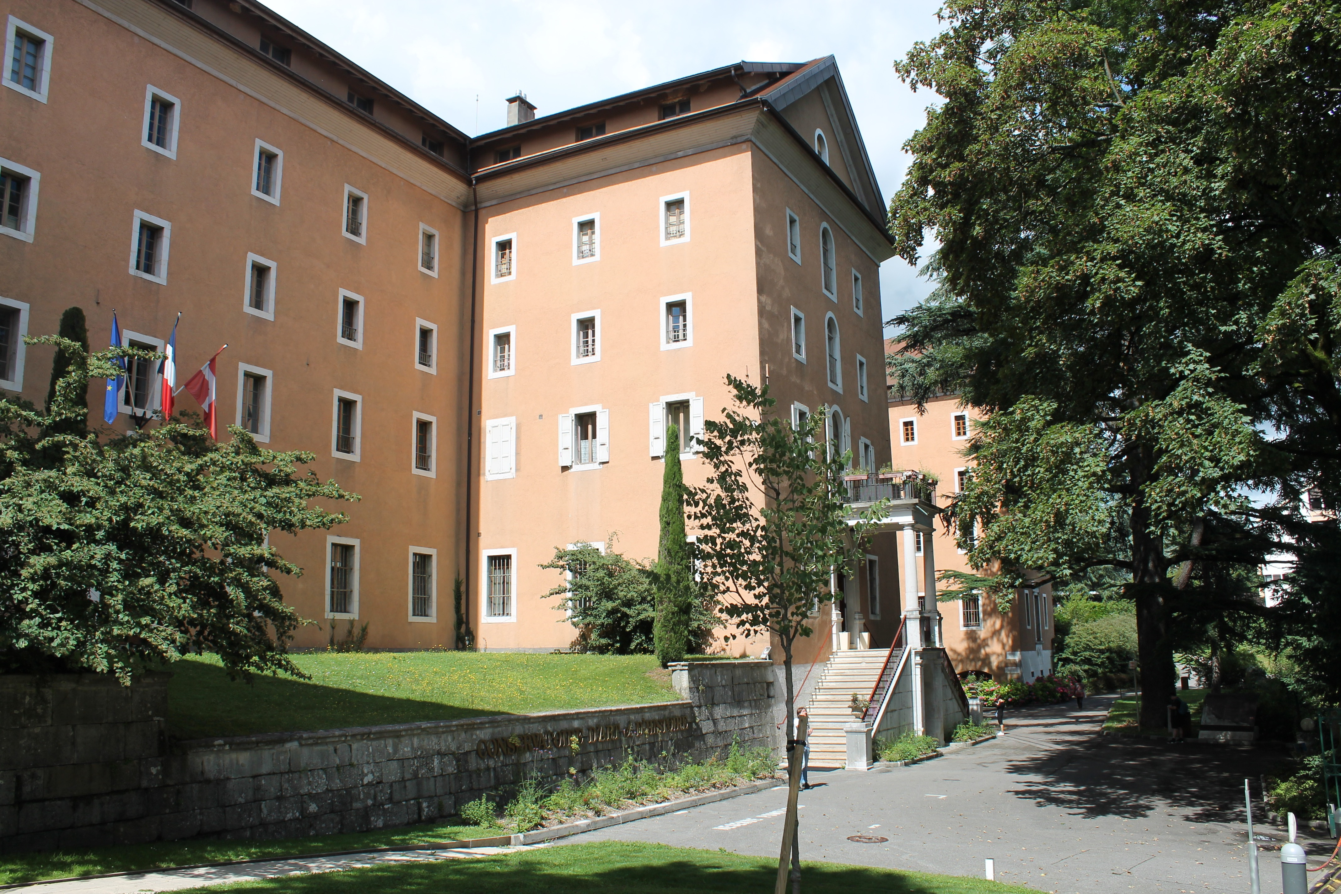 Grand séminaire d'Annecy, bâtiments des XVIIe et XVIIIe siècles, de style néoclassique sarde inscrit dans le site protégé du château d'Annecy.